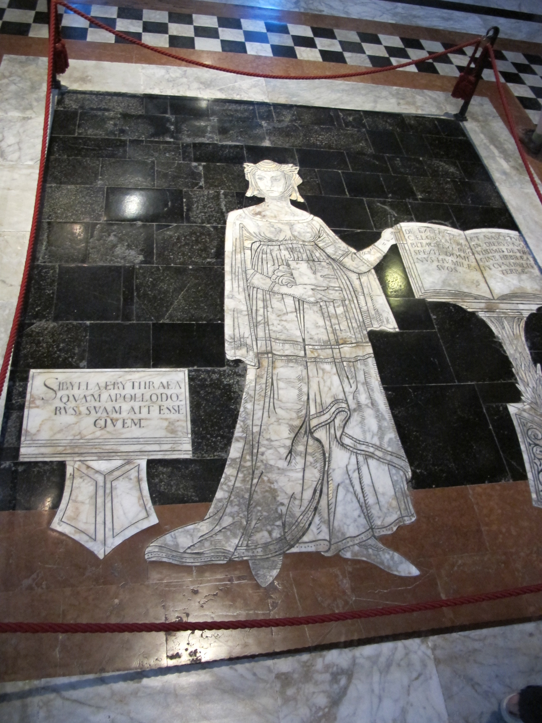 Siena, sibilla eritrea